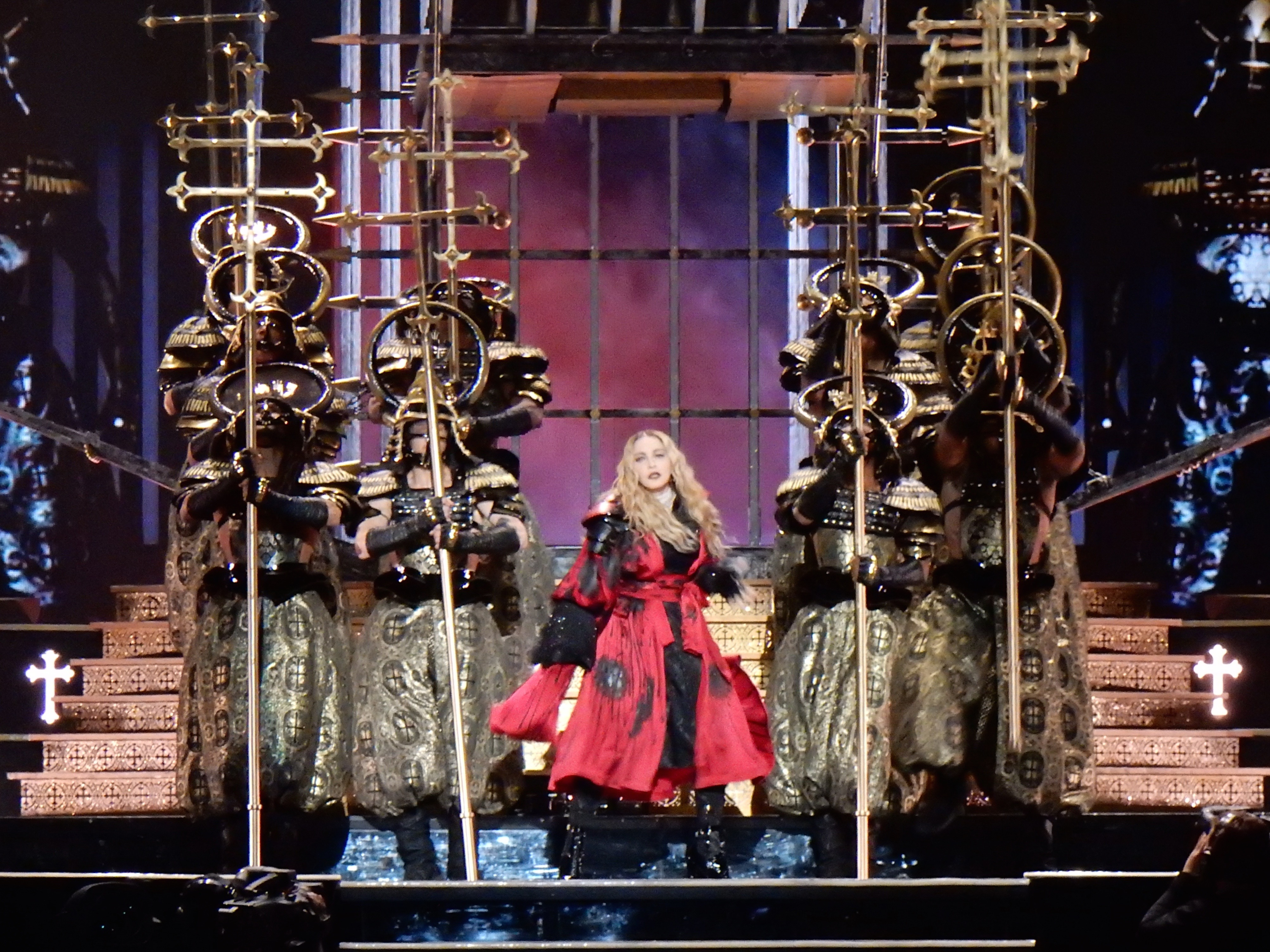 Madonna Rebel Heart Tour 2015 - Stockholm